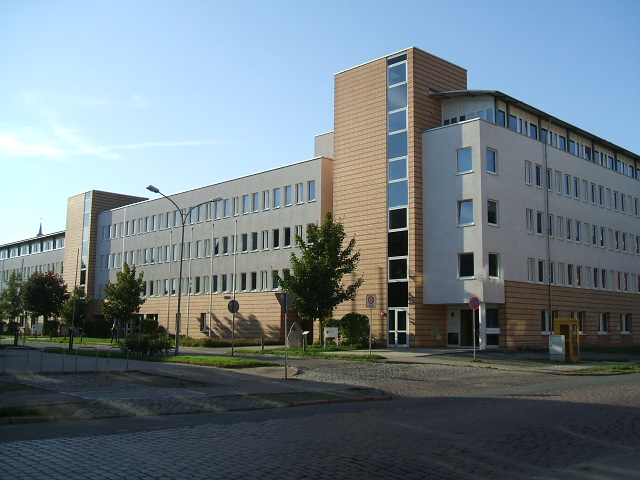 Stralsund, Germany, Dienstgebäude des Bergamtes und des Landgerichts am Frankendamm, Ecke Wulflamufer